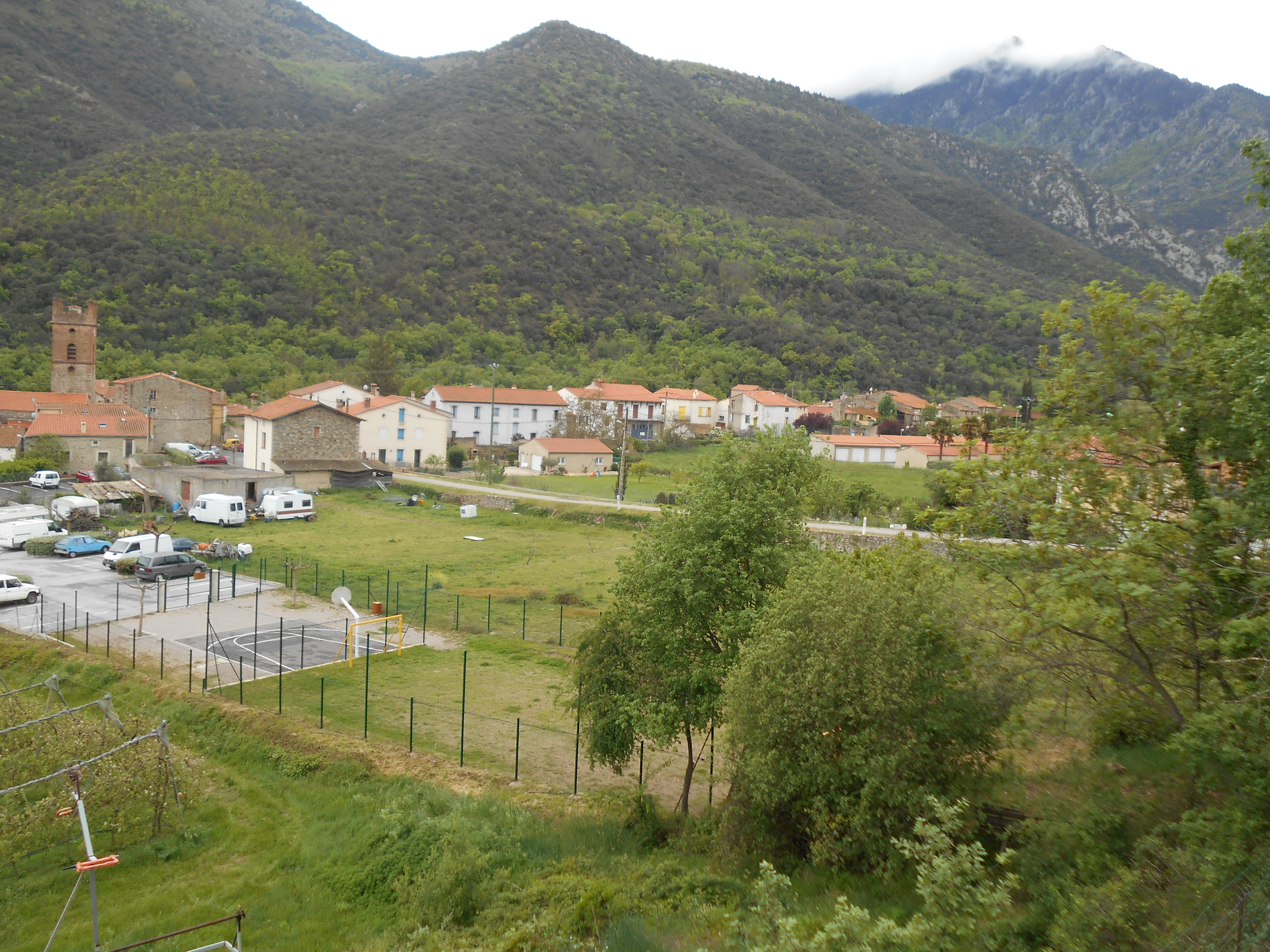 La Ferreris d'Estoer